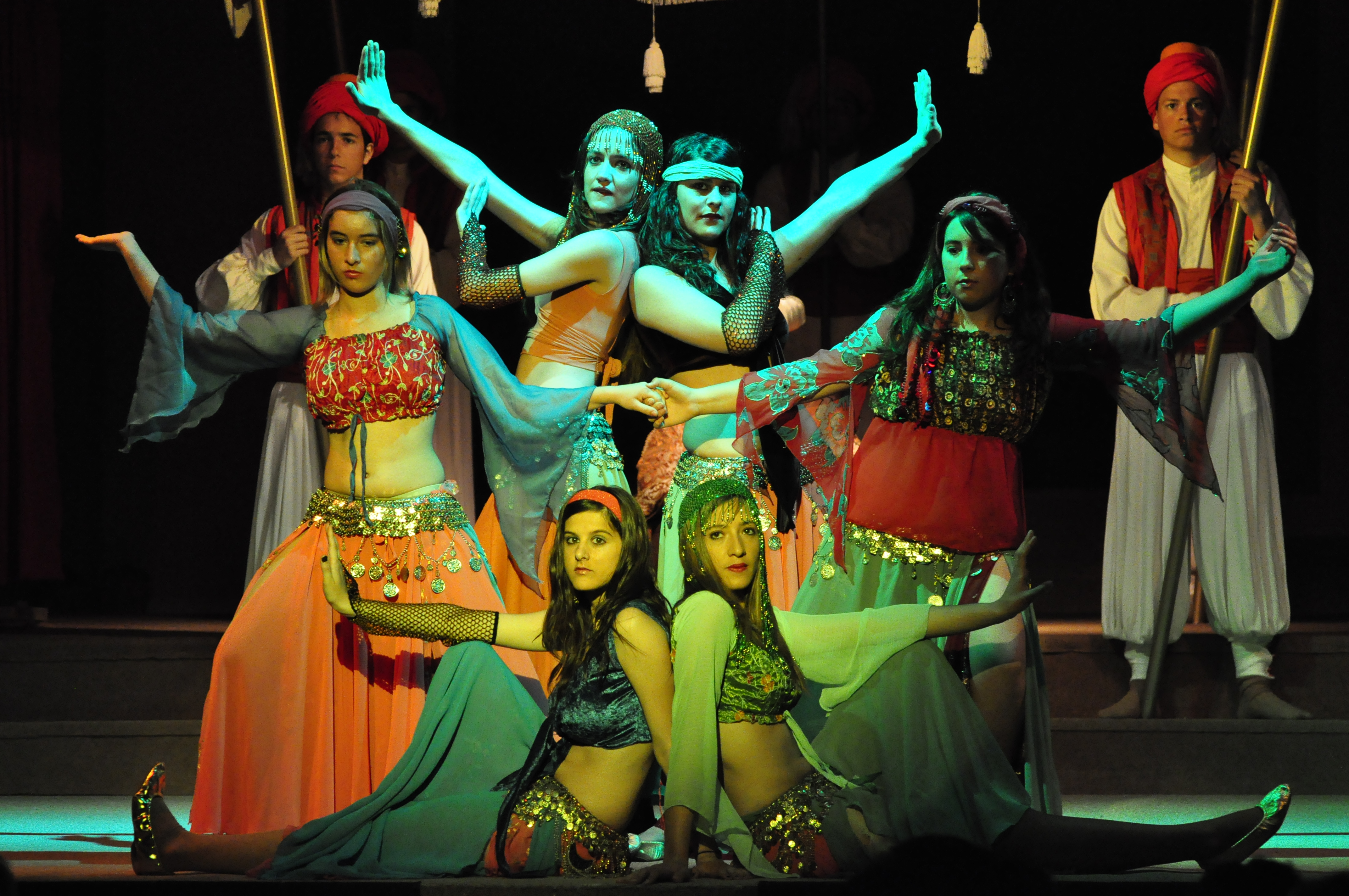 Final d'una de les danses mores, al Ball del Sant Crist de Salomó.